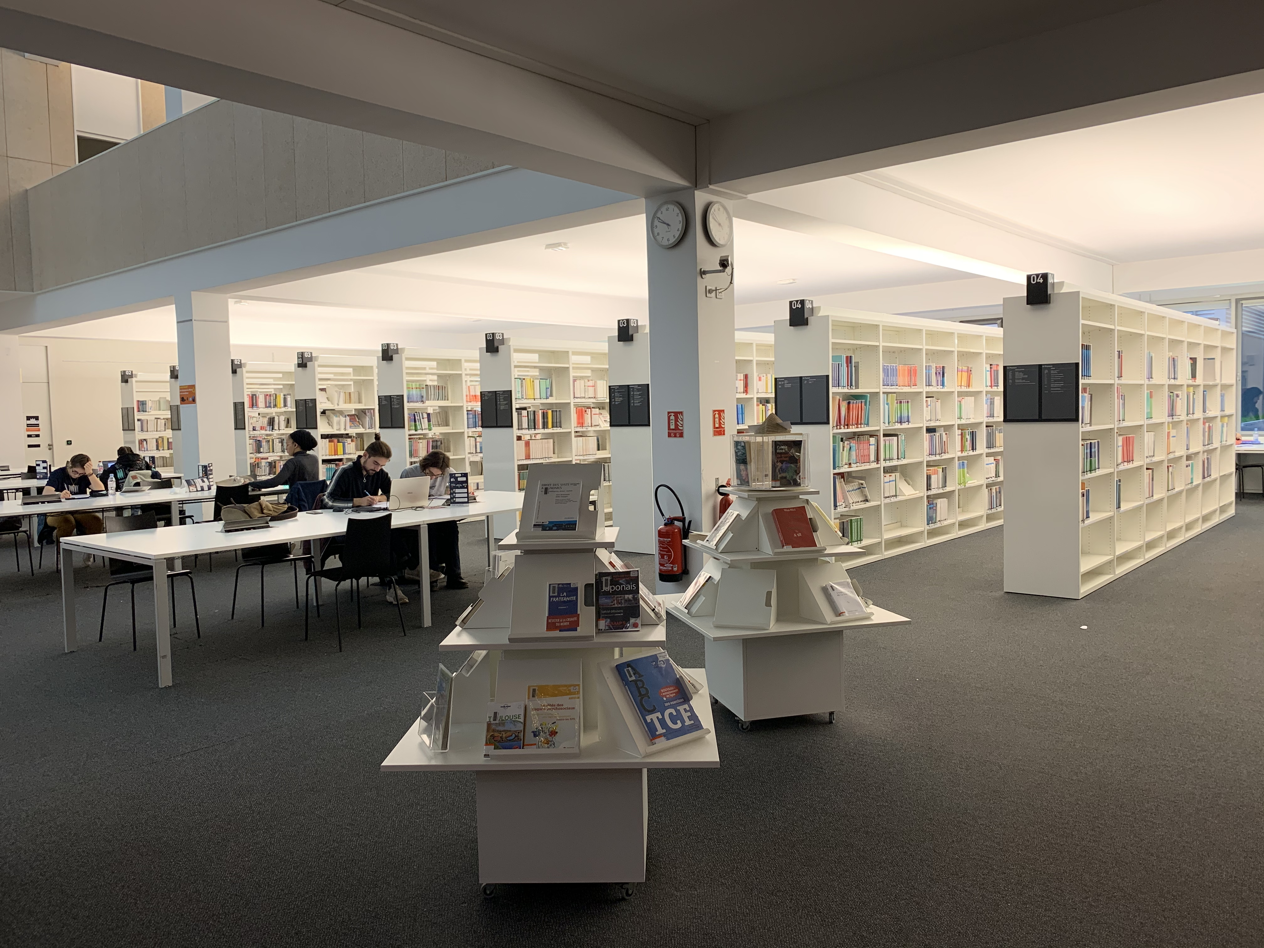 Bibliothèque Marie Curie (INSA Lyon), novembre 2019.